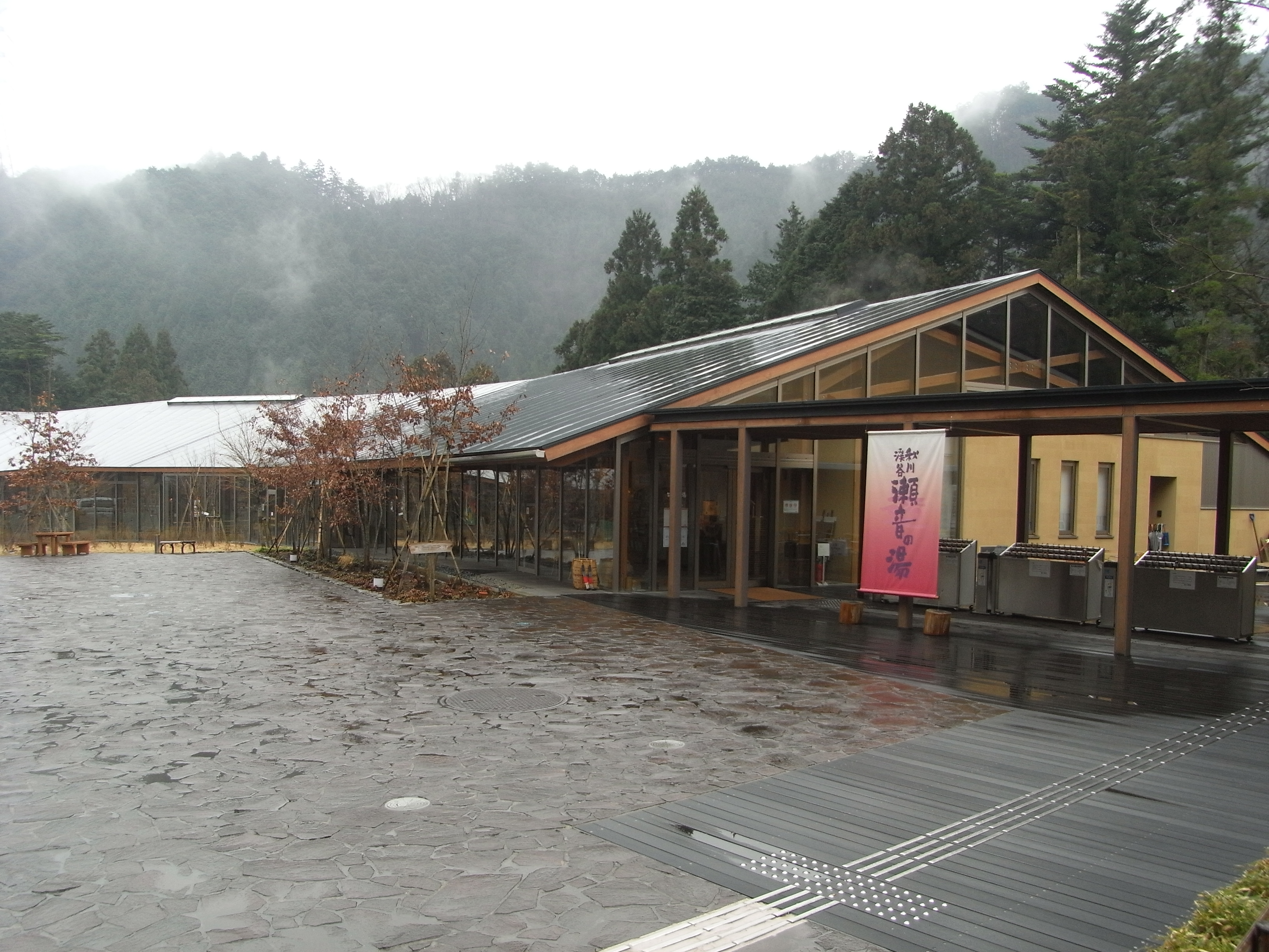 秋川渓谷瀬音の湯の外観です